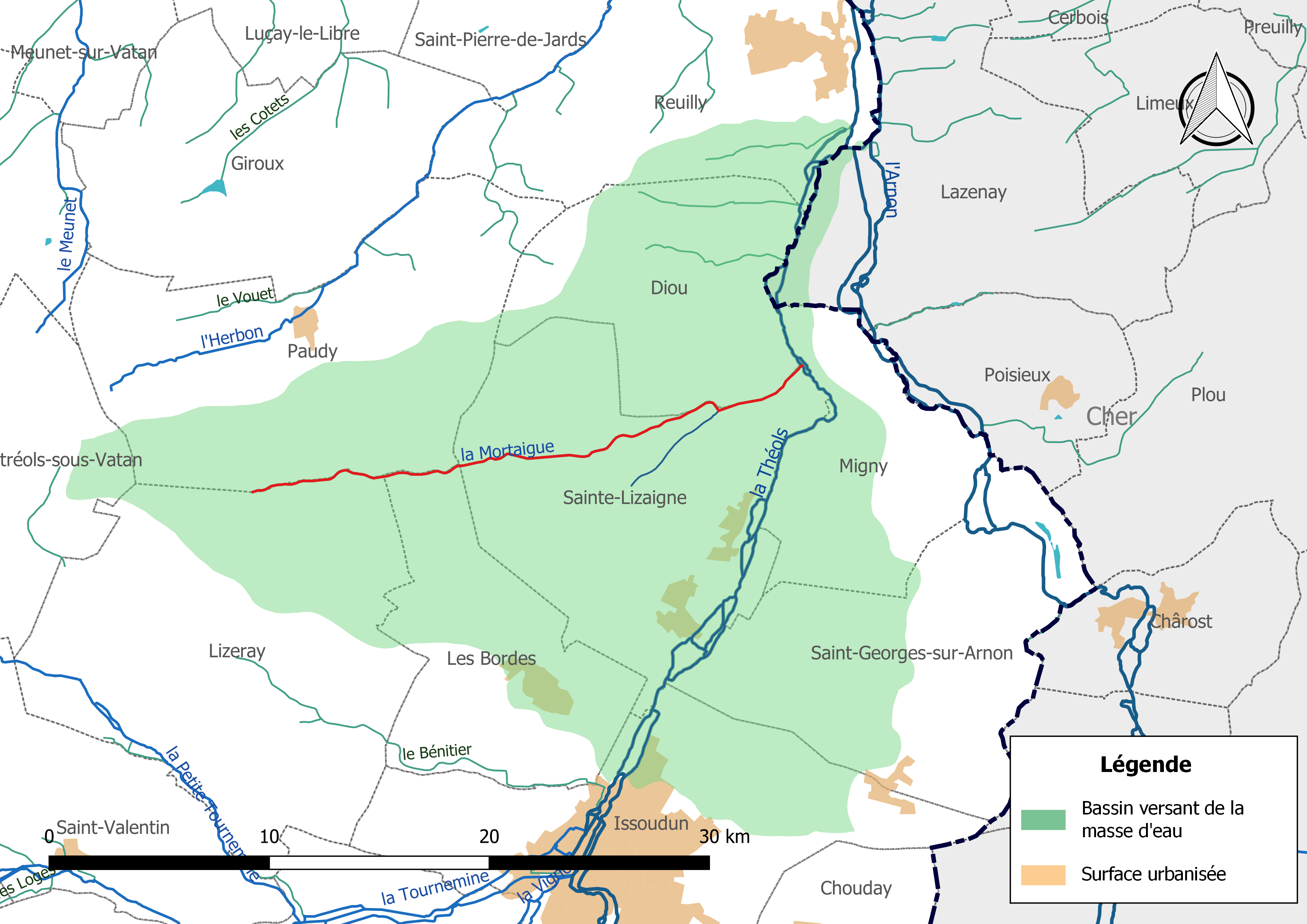 Carte de la masse d'eau « FRGR0340b », avec mise en exergue du cours d'eau « la Mortaigue» (en rouge).